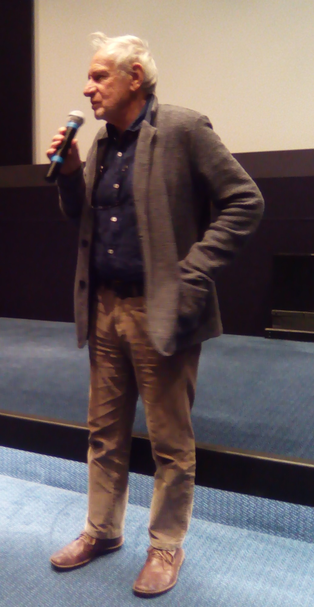 Jean-François Laguionie à la projection de son film "L'Île de Black Mór" à la cinémathèque française.